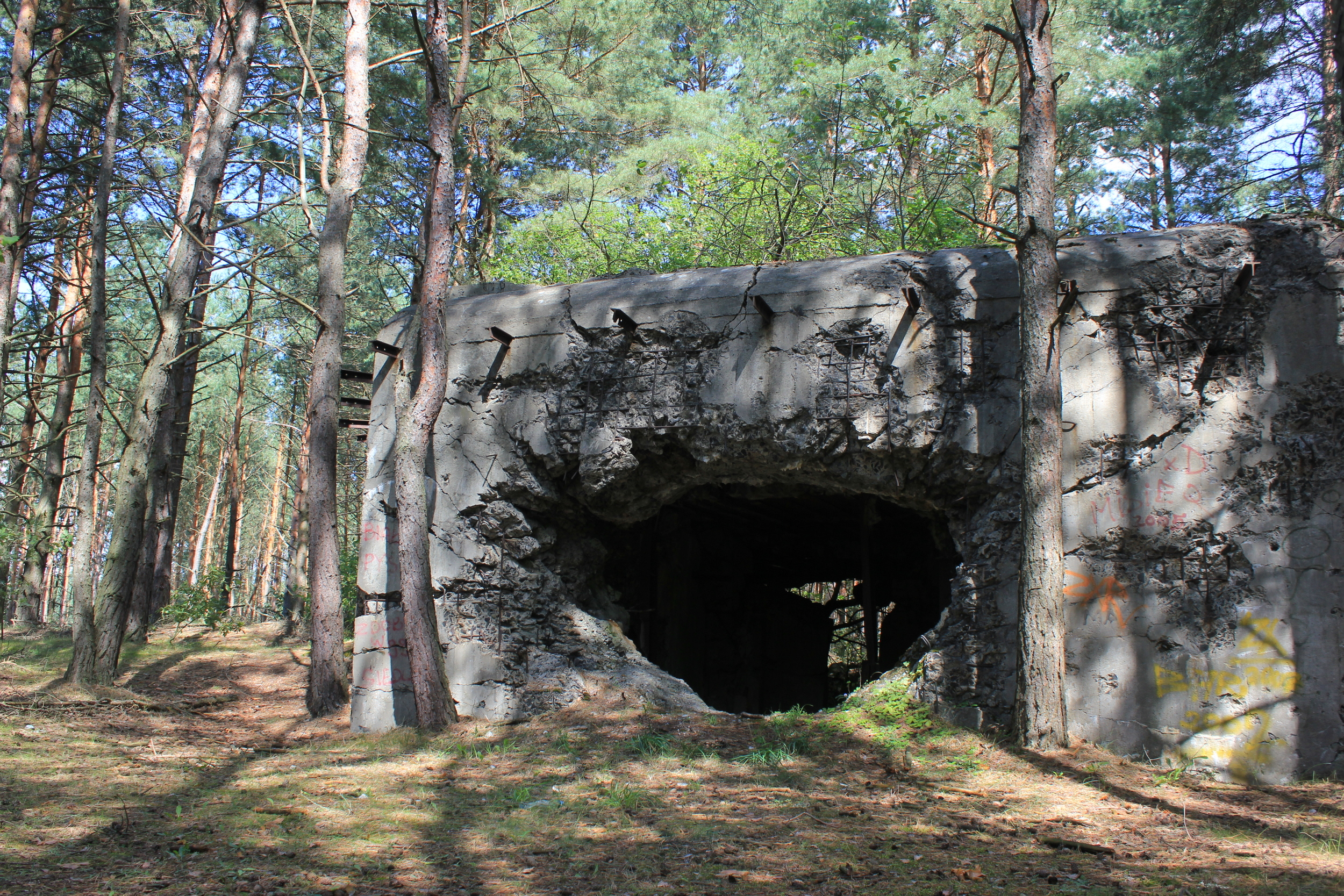 Bunker der Molotowlinie im Wald bei Anusin, Landgemeinde Siemiatycze, Podlachien.Hornjoserbsce: Bunker Molotowskeje linije pola Siemiatycz w Podlaskej, Pólska.